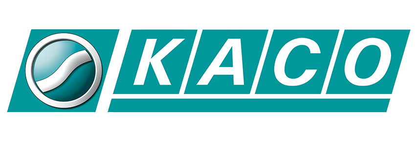 Logo KACO GmbH + Co. KG